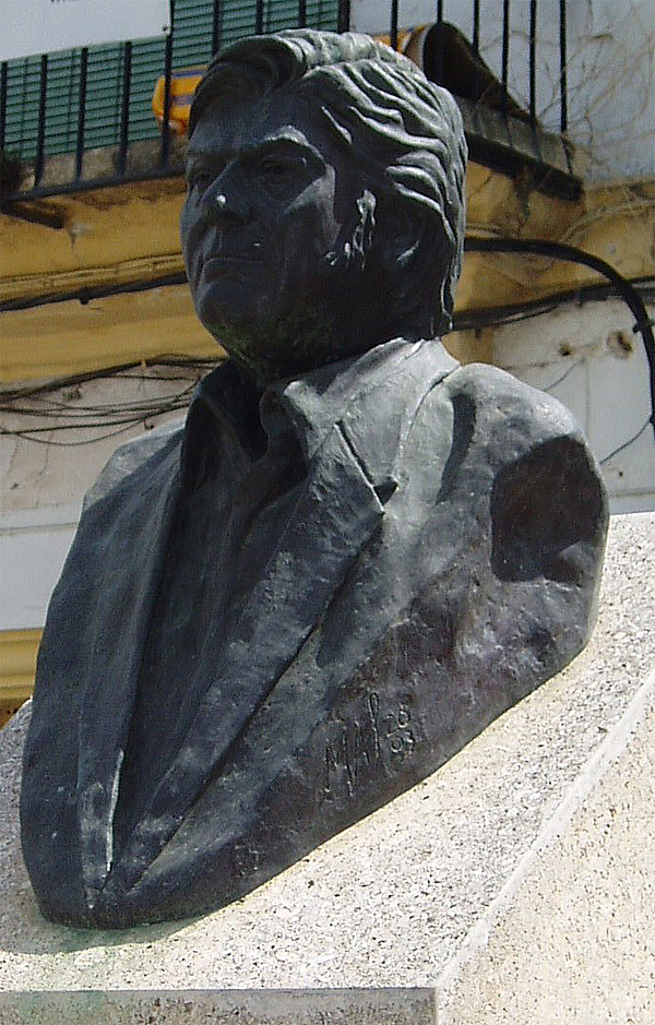 Busto de El Sordera de Jerez, cantaor flamenco, situado en la Plaza de Santiago en Jerez de la Frontera, Andalucía, España.